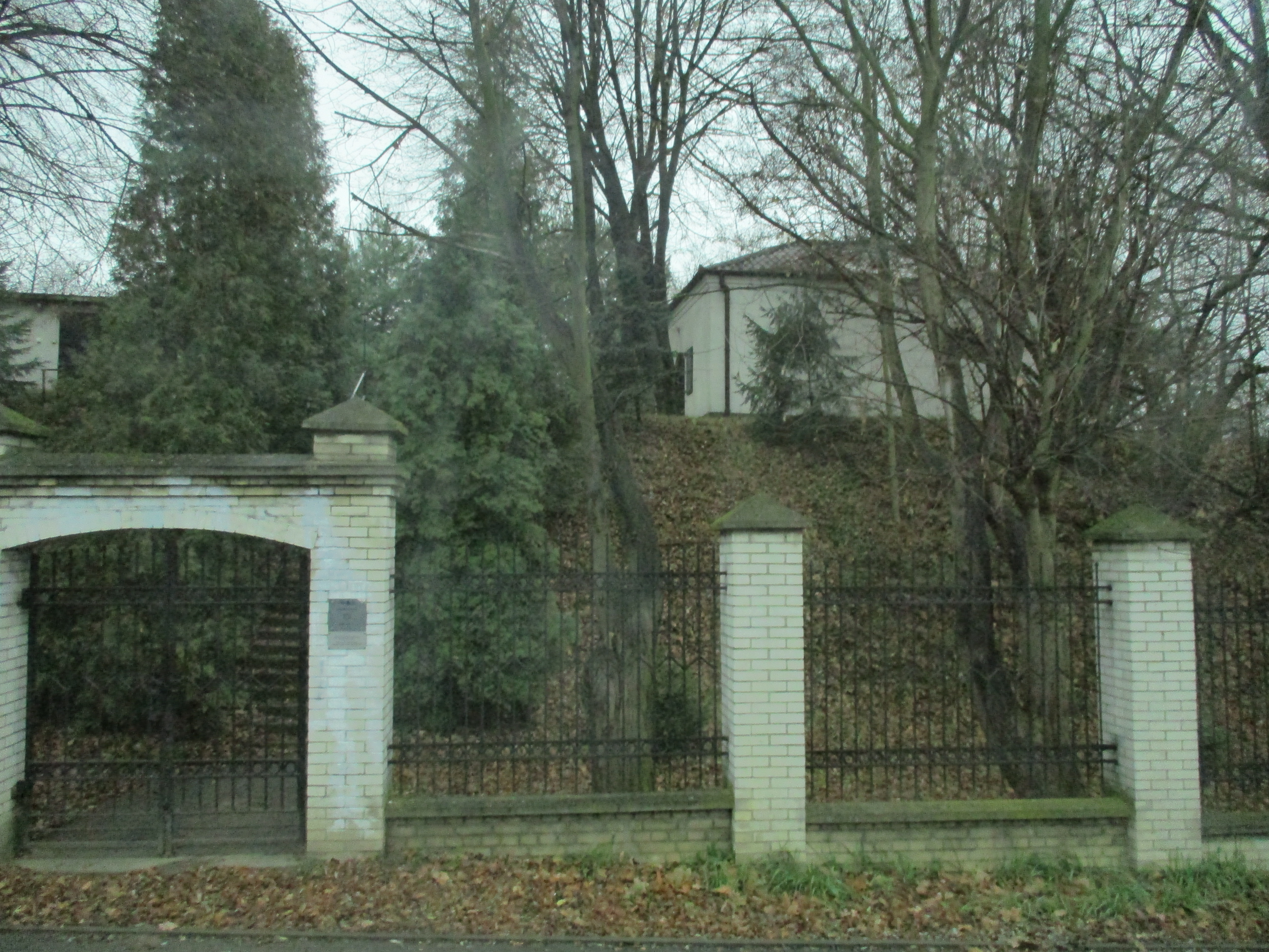 בית הקברות היהודי בלנצוט.jpg